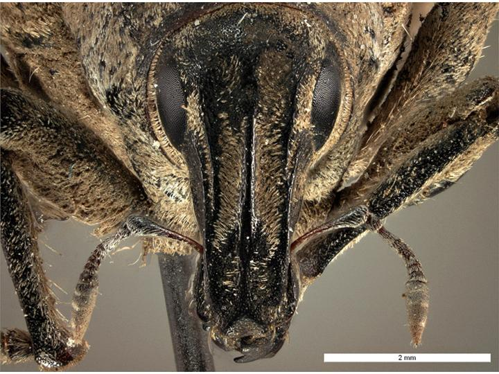 Image of the head of the sugarbeet weevil Asptoparthenis punctiventris